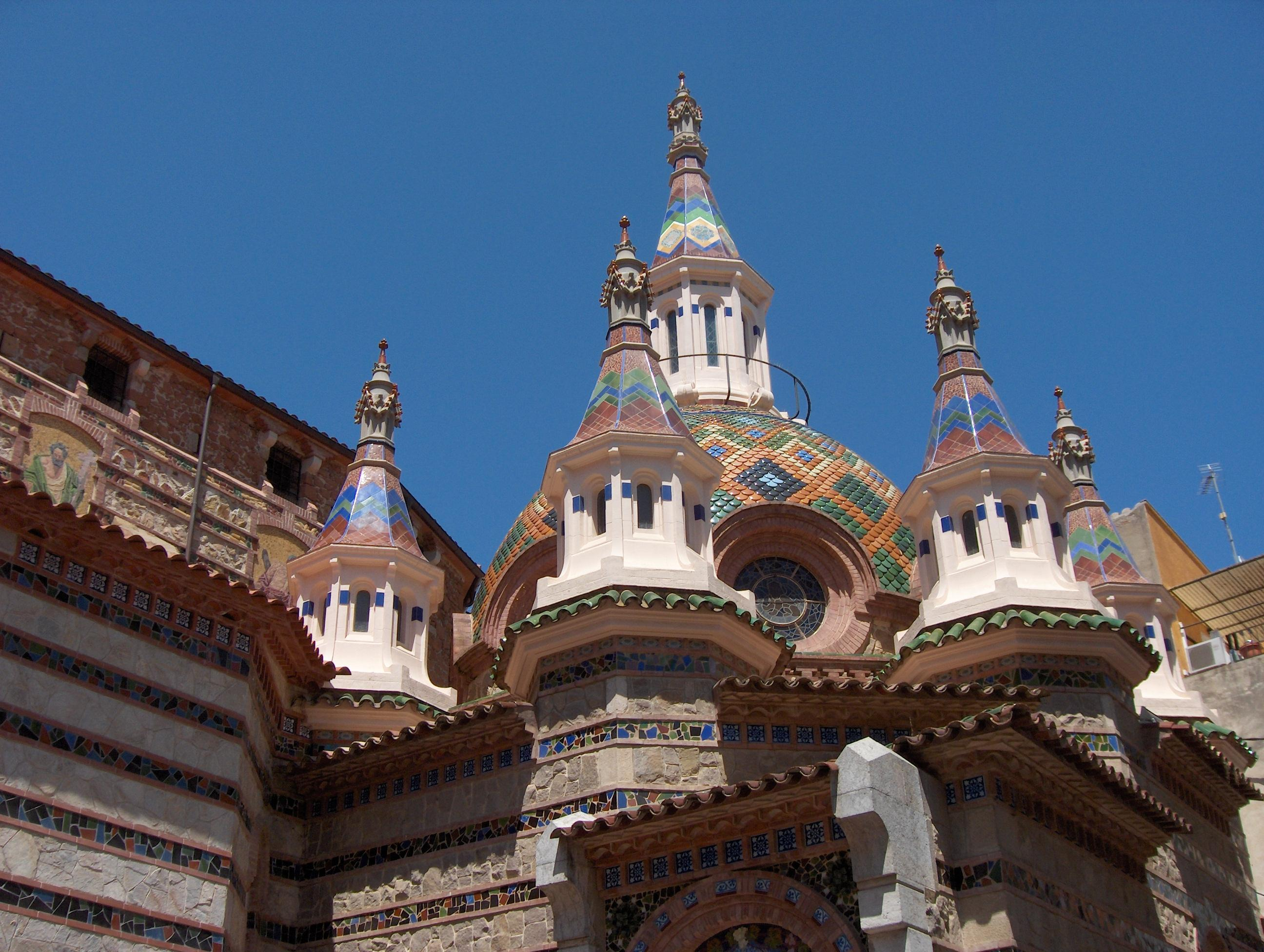 "Esglesis de Sant Romá" in der Altstadt von Lloret de Mar